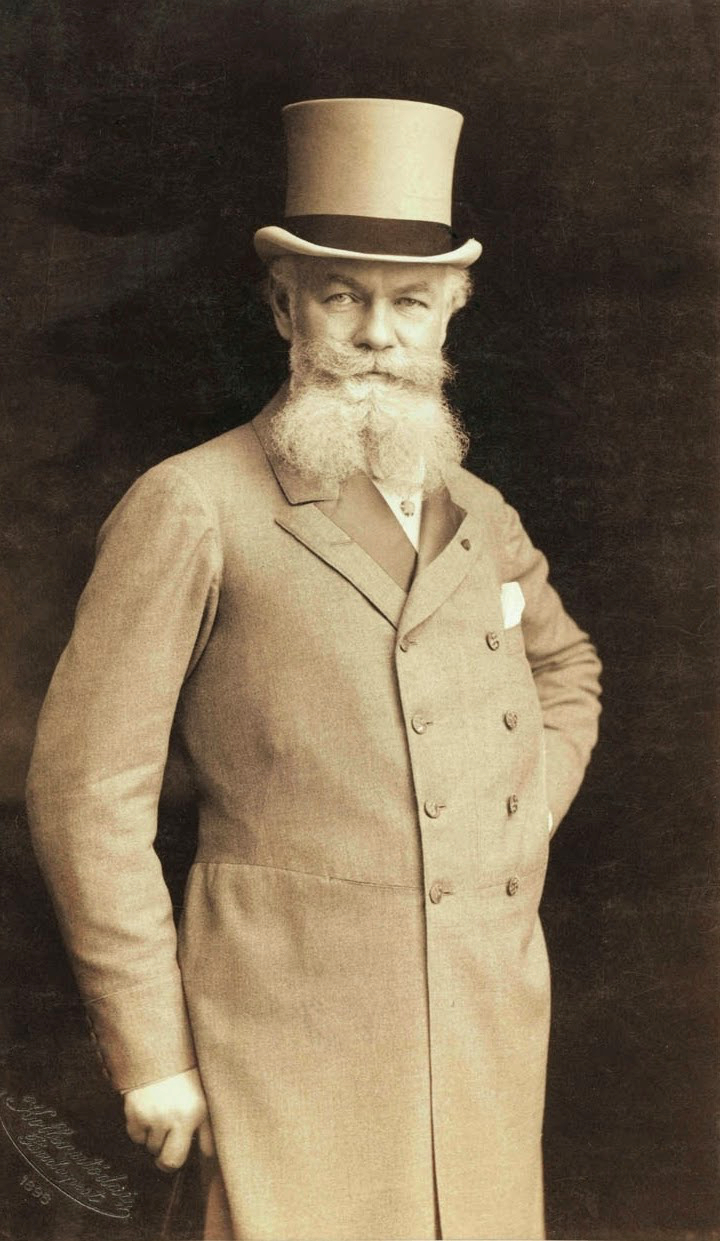 Munkácsy Mihály, németül: Michael von Munkácsy, francia nyelvterületen Michel Léo de Munkácsyként is előfordul (született: Lieb Mihály Leó, Munkács, 1844. február 20. – Endenich, Németország, 1900. május 1.) magyar festőművész.